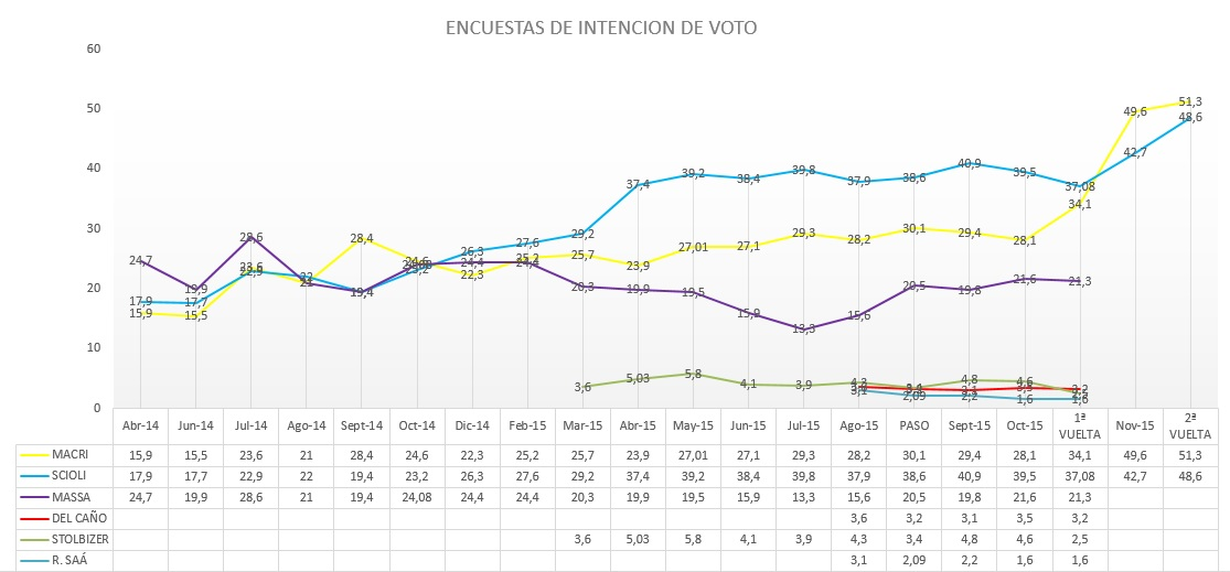 Evolucion de estimaciones de voto en Argentina desde abril de 2014 hasta noviembre de 2015. Se representa el promedio.